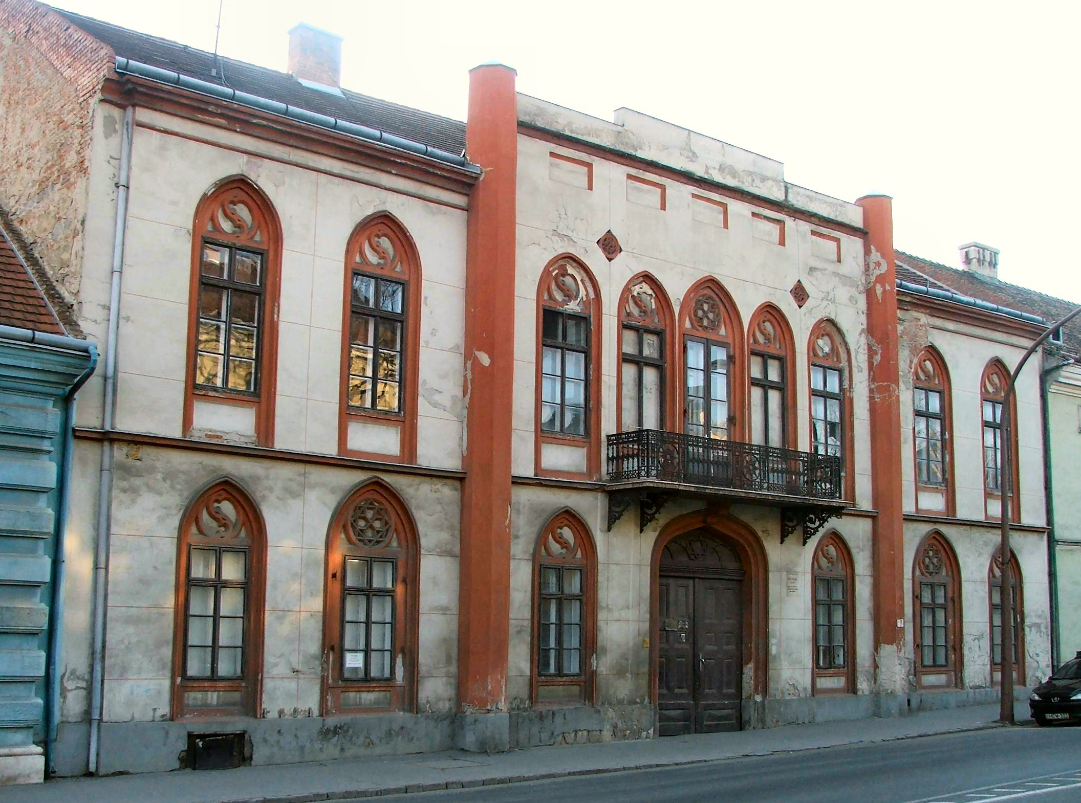 Wimmer-ház, Bajcsy-Zs utca 22.